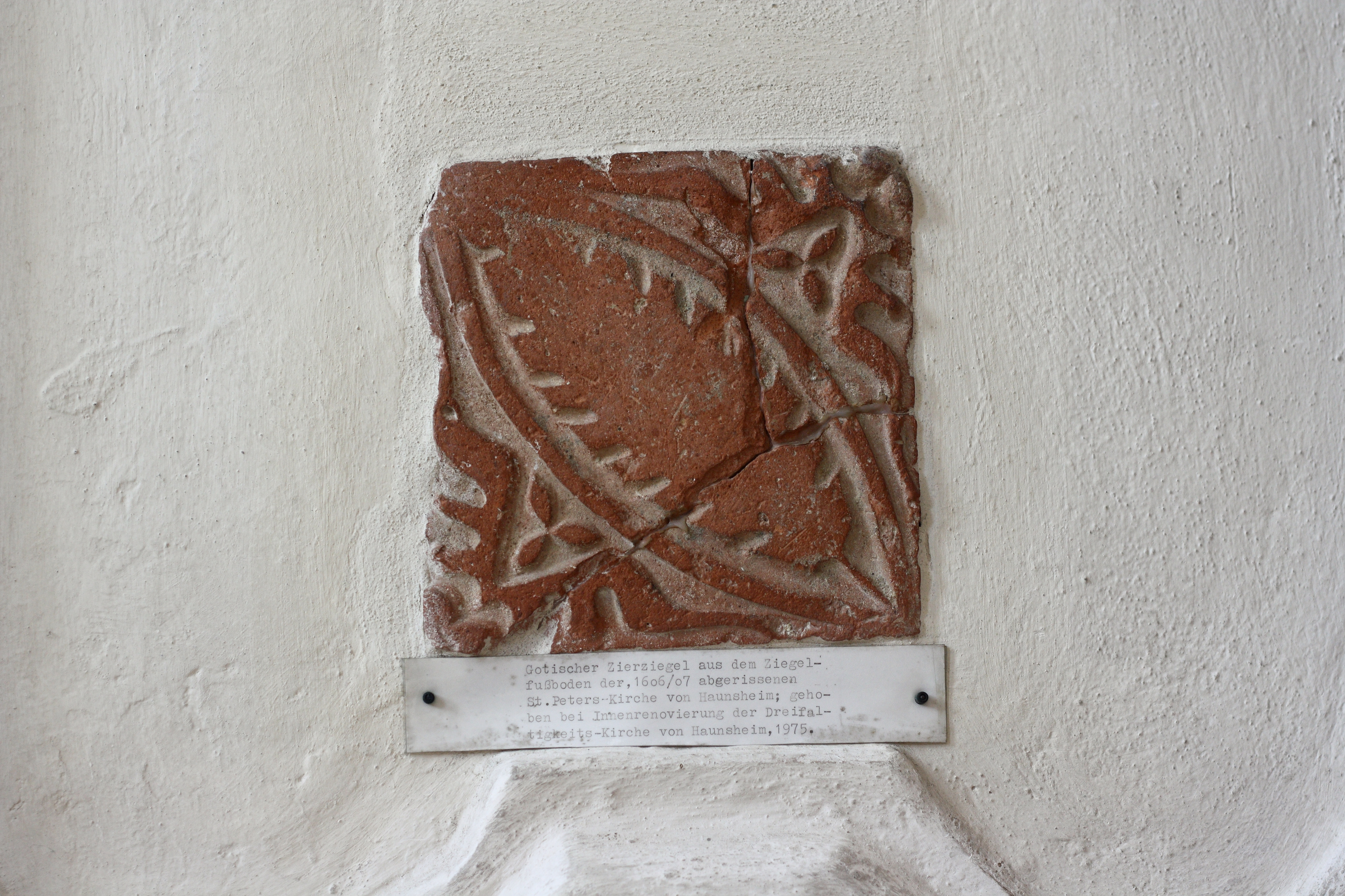 Evangelisch-lutherische Dreifaltigkeitskirche in Haunsheim, einer Gemeinde im Landkreis Dillingen an der Donau (Bayern), gotischer Zierziegel aus der 1606/1607 abgerissenen Kirche St. Peter in Haunsheim